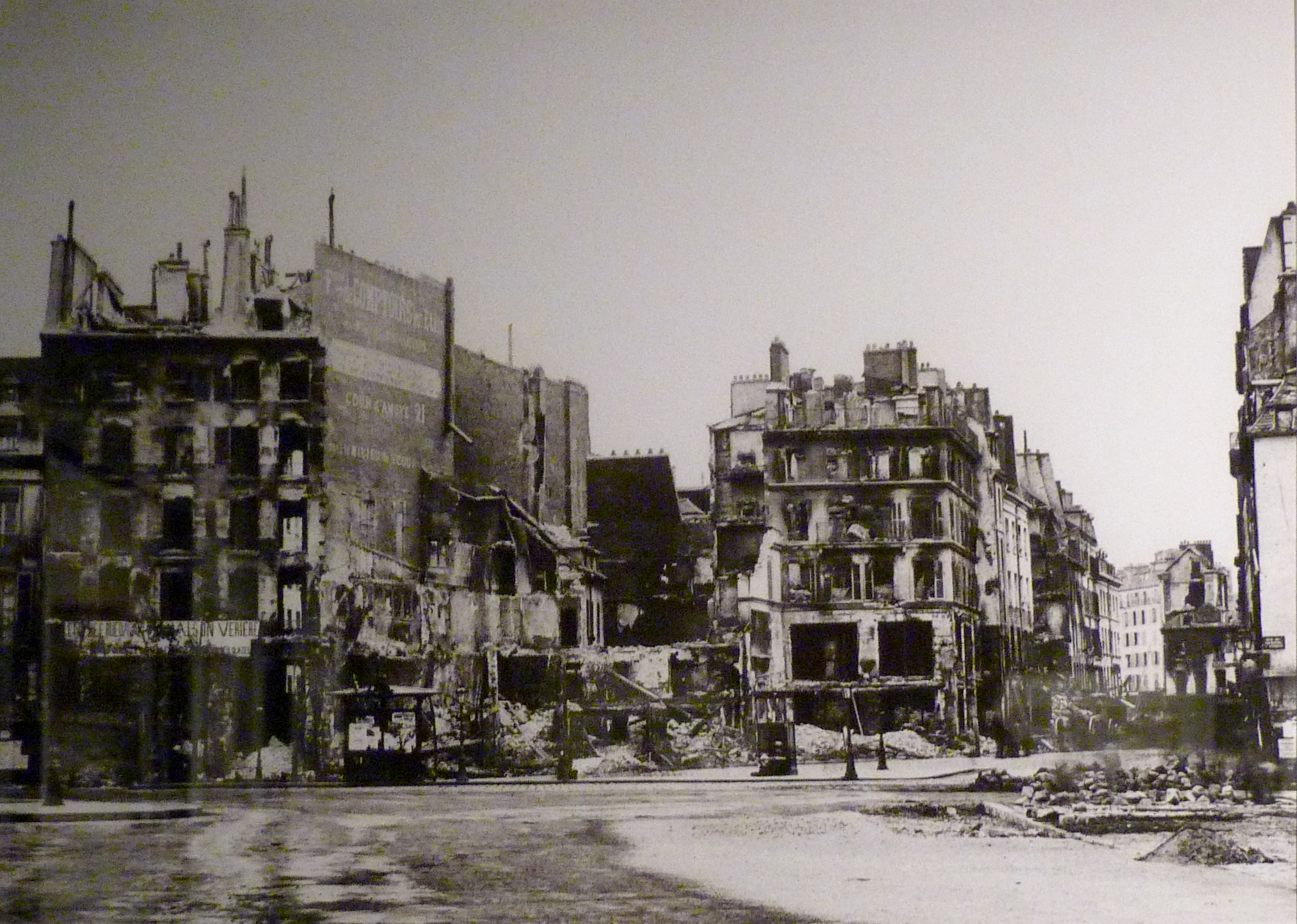 Exposition La Commune de Paris à l'Hôtel de Ville de Paris (18 mars - 28 mai 2011) - Place de la Bastille vue de la rue de la Roquette.